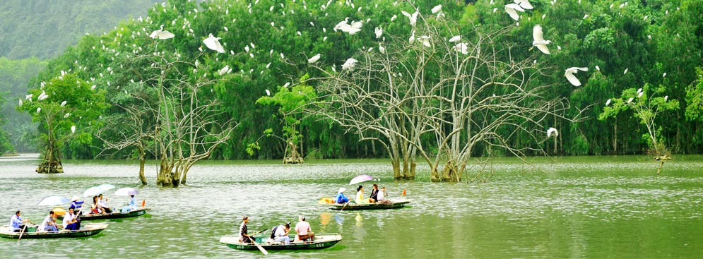 Vườn Chim Thung Nham thuộc Khu du lịch sinh thái Vườn Chim Thung Nham